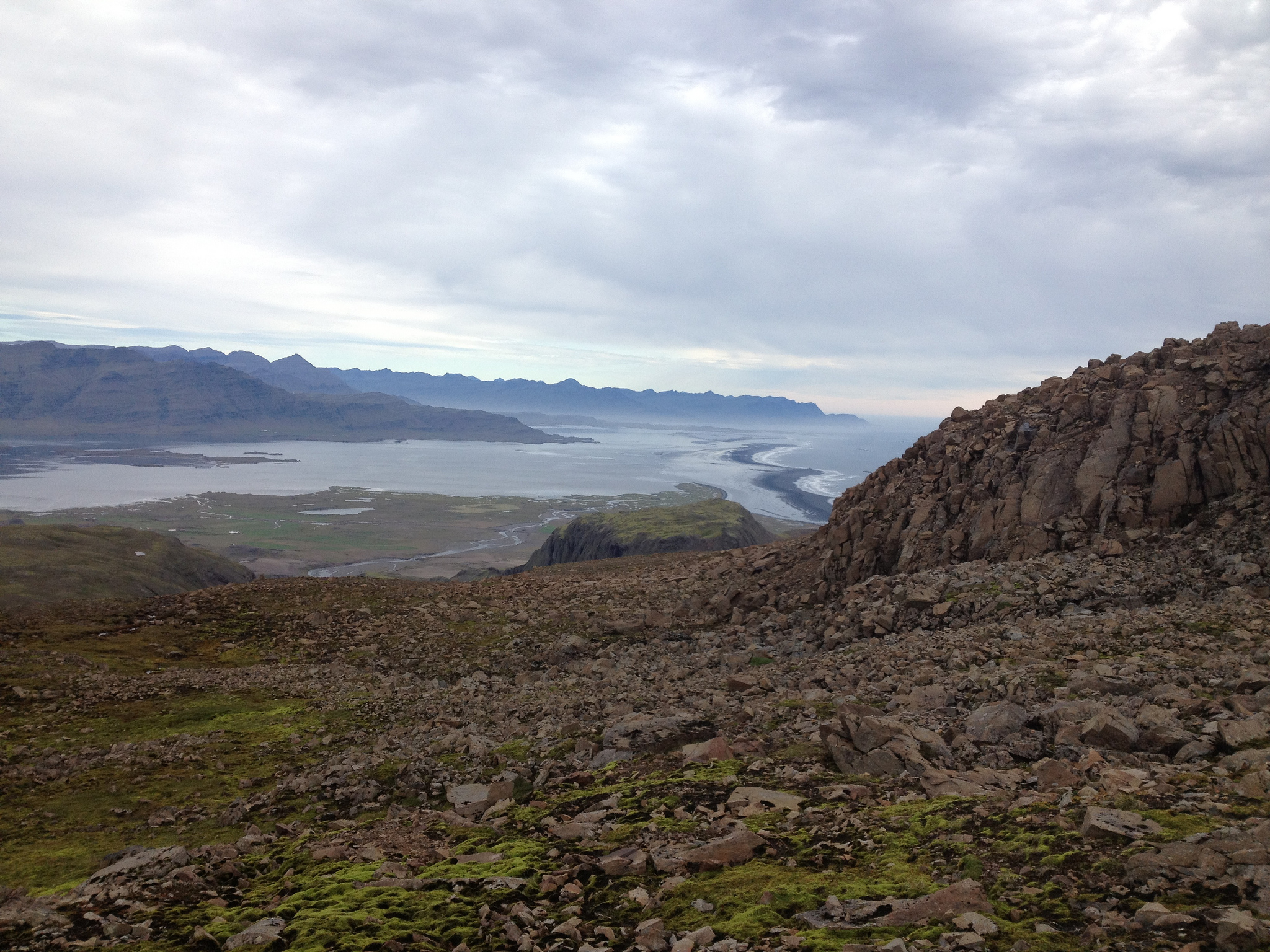 Álftafjörður séð frá Snjótindi.